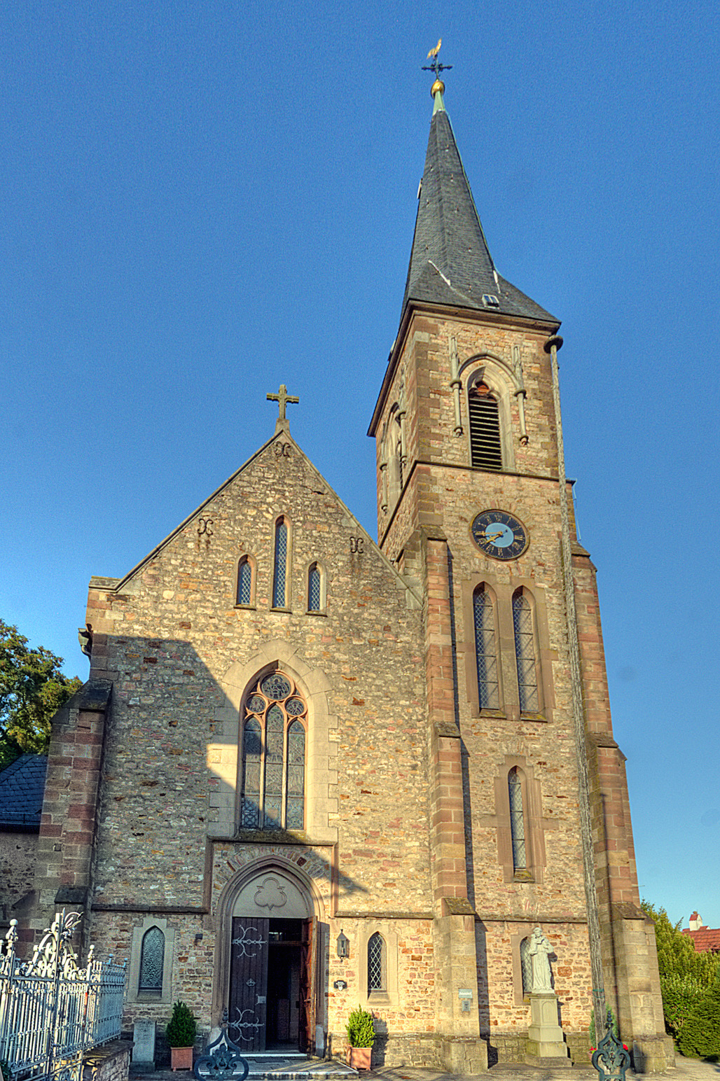 Neugotische Pfarrkirche St. Laurentius in Bad Soden in Deutschland. Erbaut 1893-1896